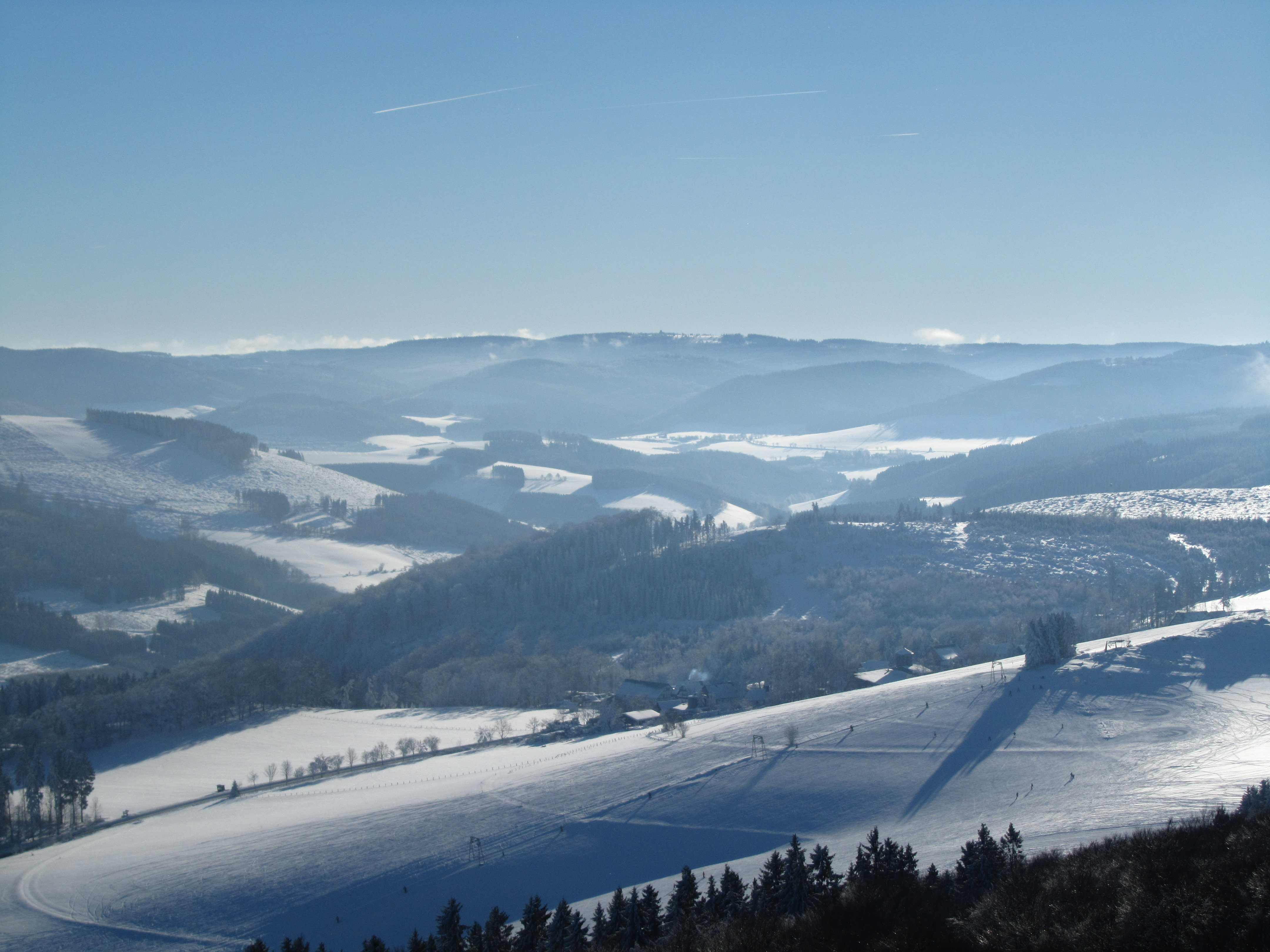 Blick vom Stüppeltum nach Süden zum Kahlen Asten